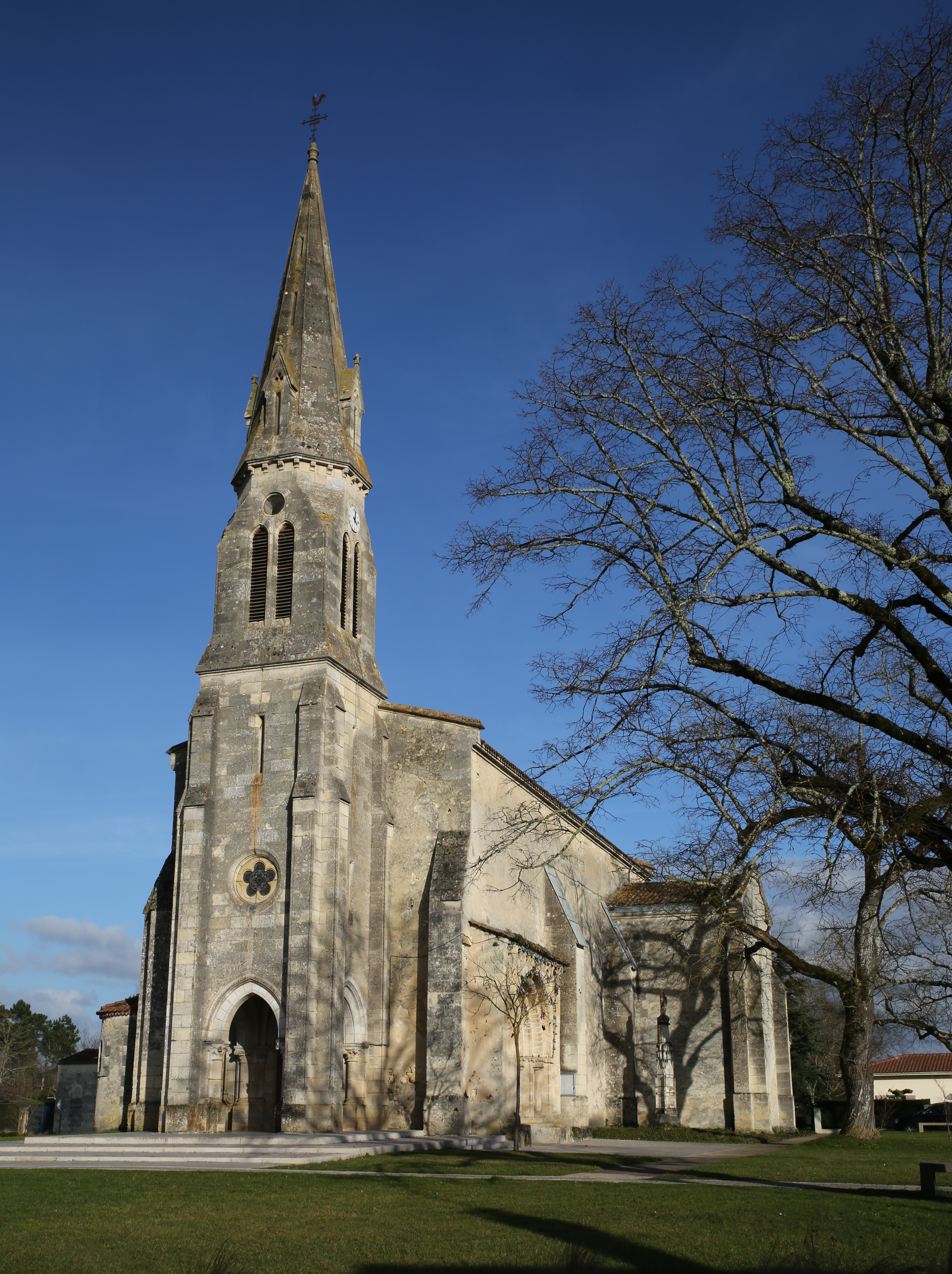 Église d'Arsac